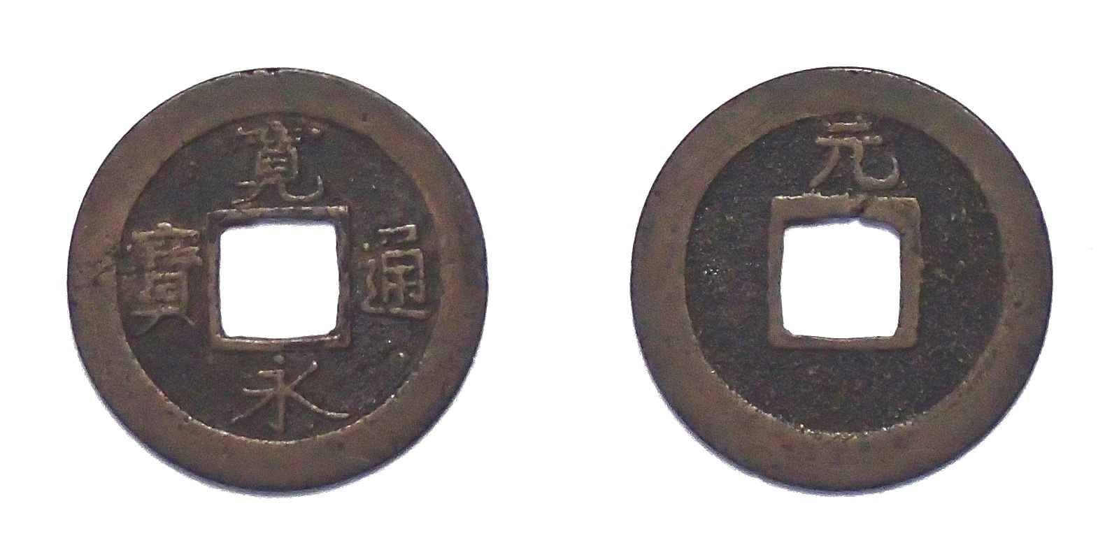 寛永通寳・寛保期高津銭, 元